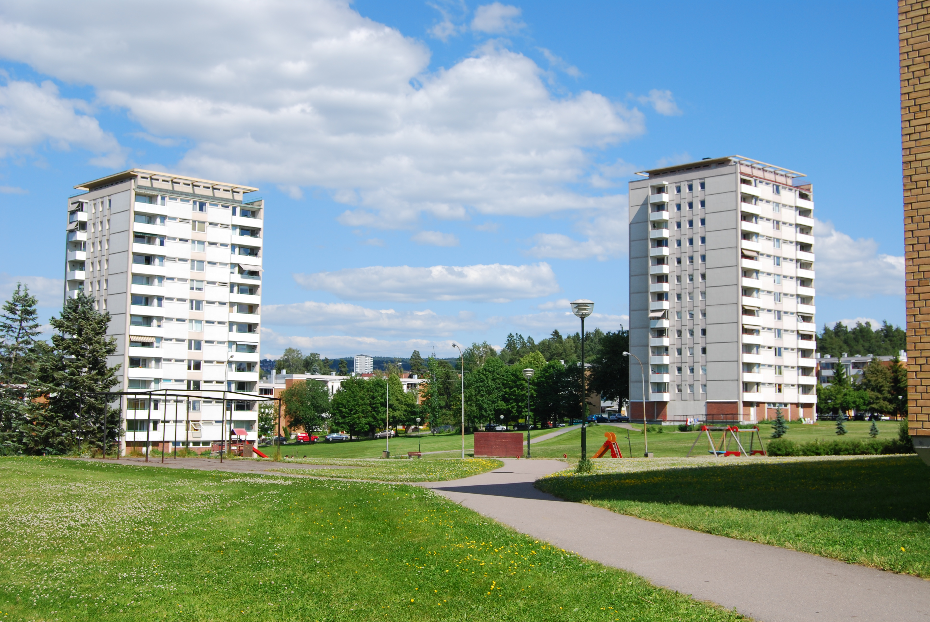 Manglerud Oslo; osiedle mieszkaniowe 2009 r.